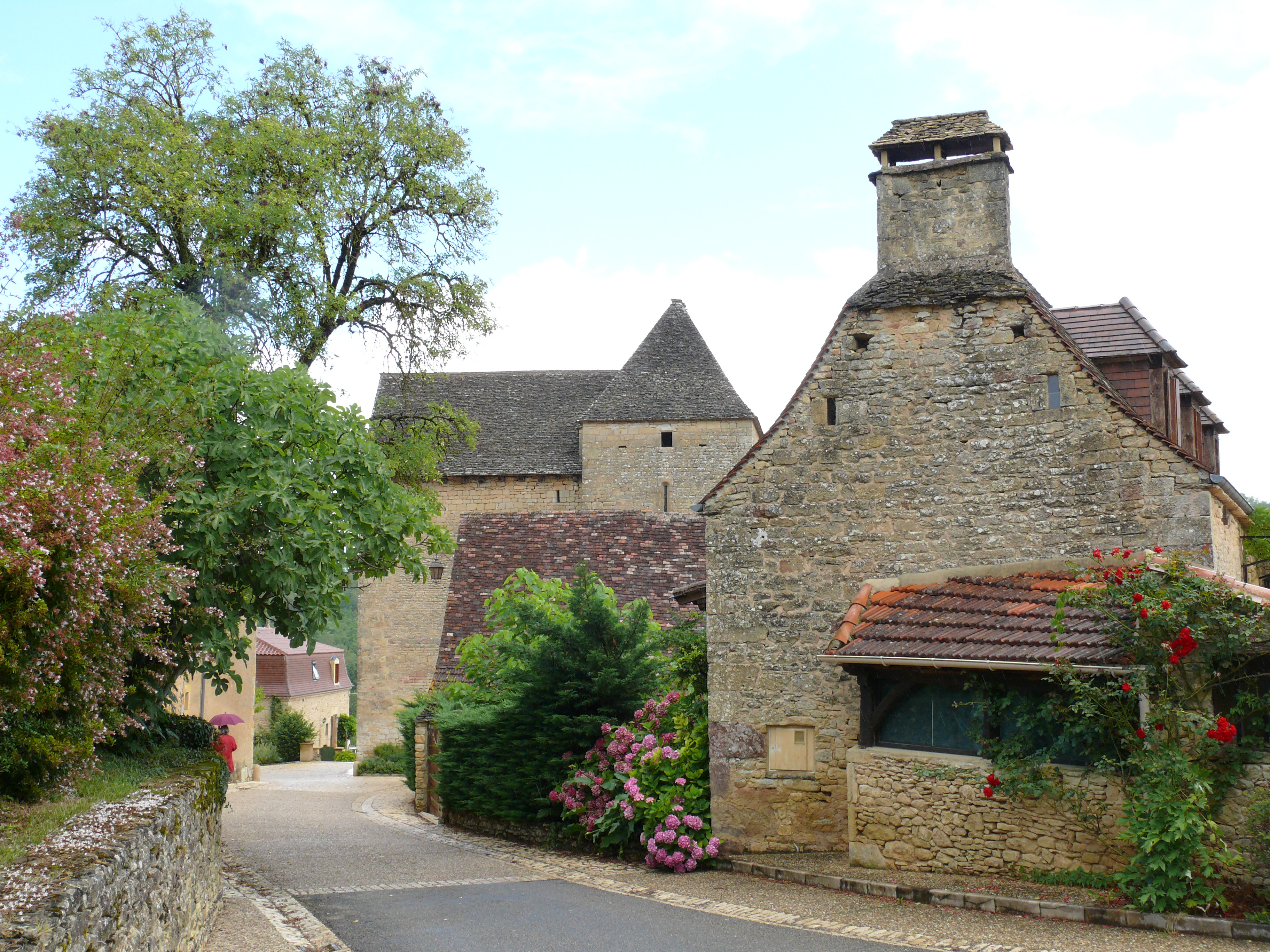 Orliac - Une entrée du village